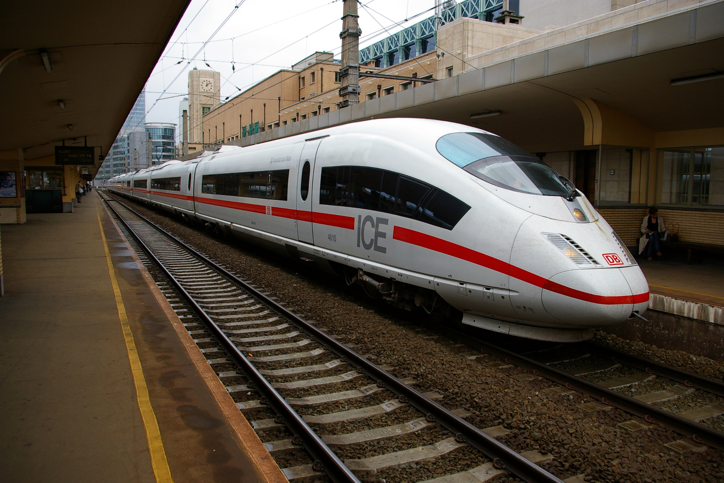 ICE 4610 en gare de Bruxelles Nord